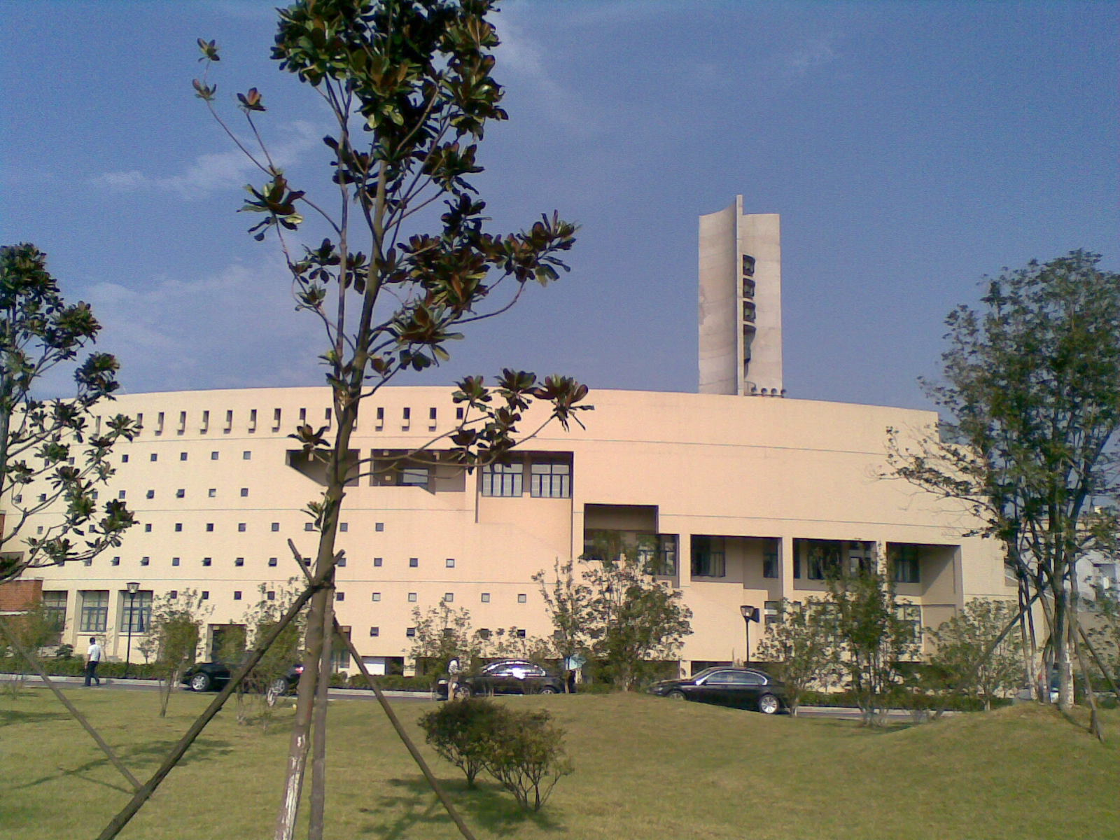 中文（中国大陆）: 南广学院学生活动中心